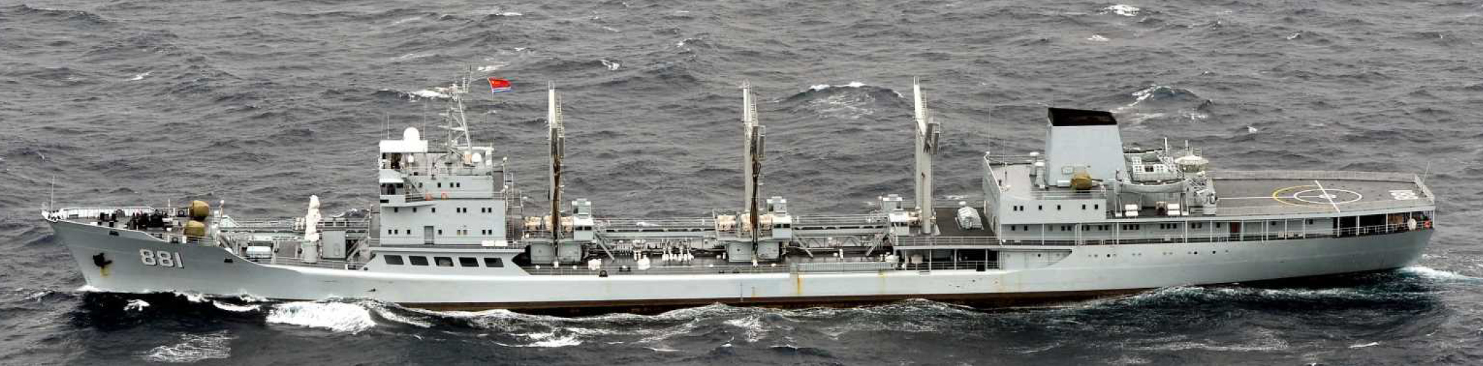 ２月１６日（火）午後５時半頃、第５航空群所属「Ｐ－３Ｃ」（那覇）、第１２護衛隊所属「とね」（呉）及び呉地方隊所属「げんかい」（佐伯）が、種子島の東北東約８５ｋｍの海域を太平洋から東シナ海に向けて西進する中国海軍ルフ級駆逐艦１隻、ジャンカイII級フリゲート１隻、ドンディアオ級情報収集艦１隻及びフーチン級補給艦１隻の合計４隻を確認した。その後、当該艦艇が、大隅海峡を西航したことを確認した。なお、当該艦艇は、１月２７日（水）に対馬海峡を北上、２月２日（火）に津軽海峡を東航したものと同一であり、ドンディアオ級情報収集艦については、２月４日（木）から８日（月）にかけて房総沖で往復航行していたものと同一である。